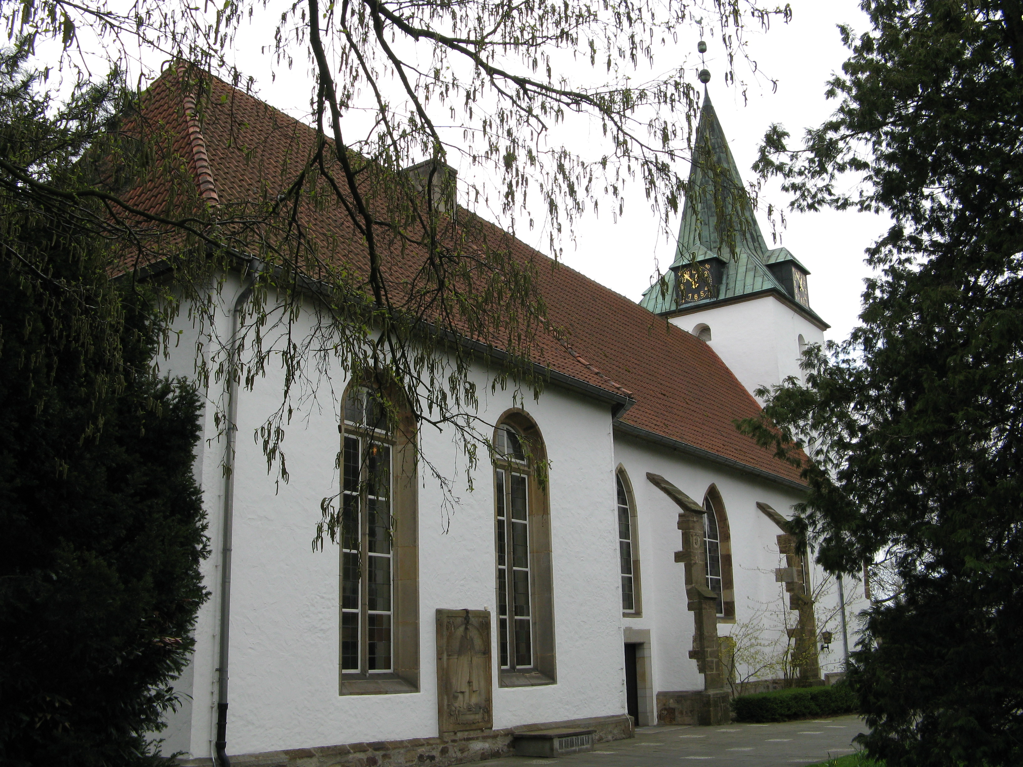 Ev. Kirche in Hille-Dorf This image shows a heritage building in Germany, located in the North Rhine-Westphalian city Hille (no. 5).